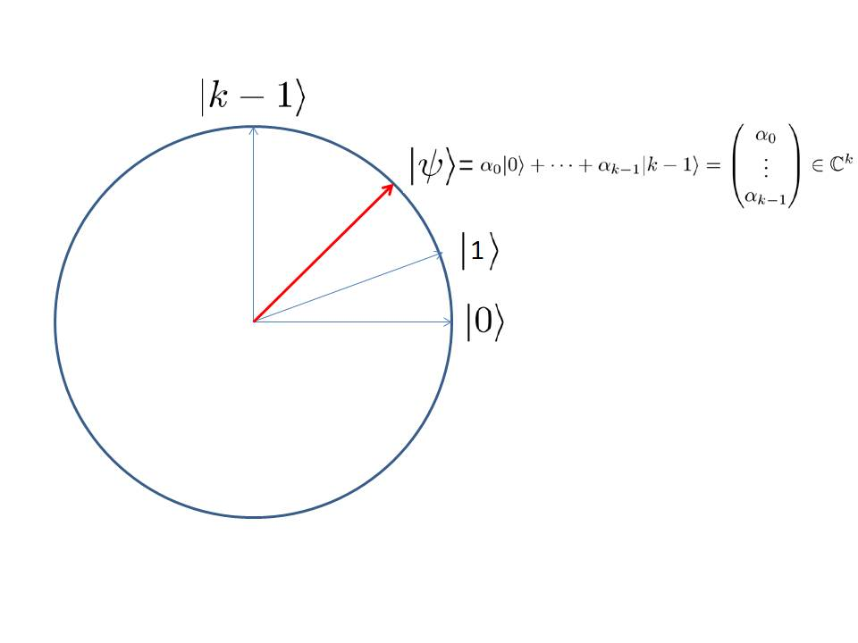 ക്വാണ്ടം കണികയുടെ വിശിഷ്ടസ്ഥിതി